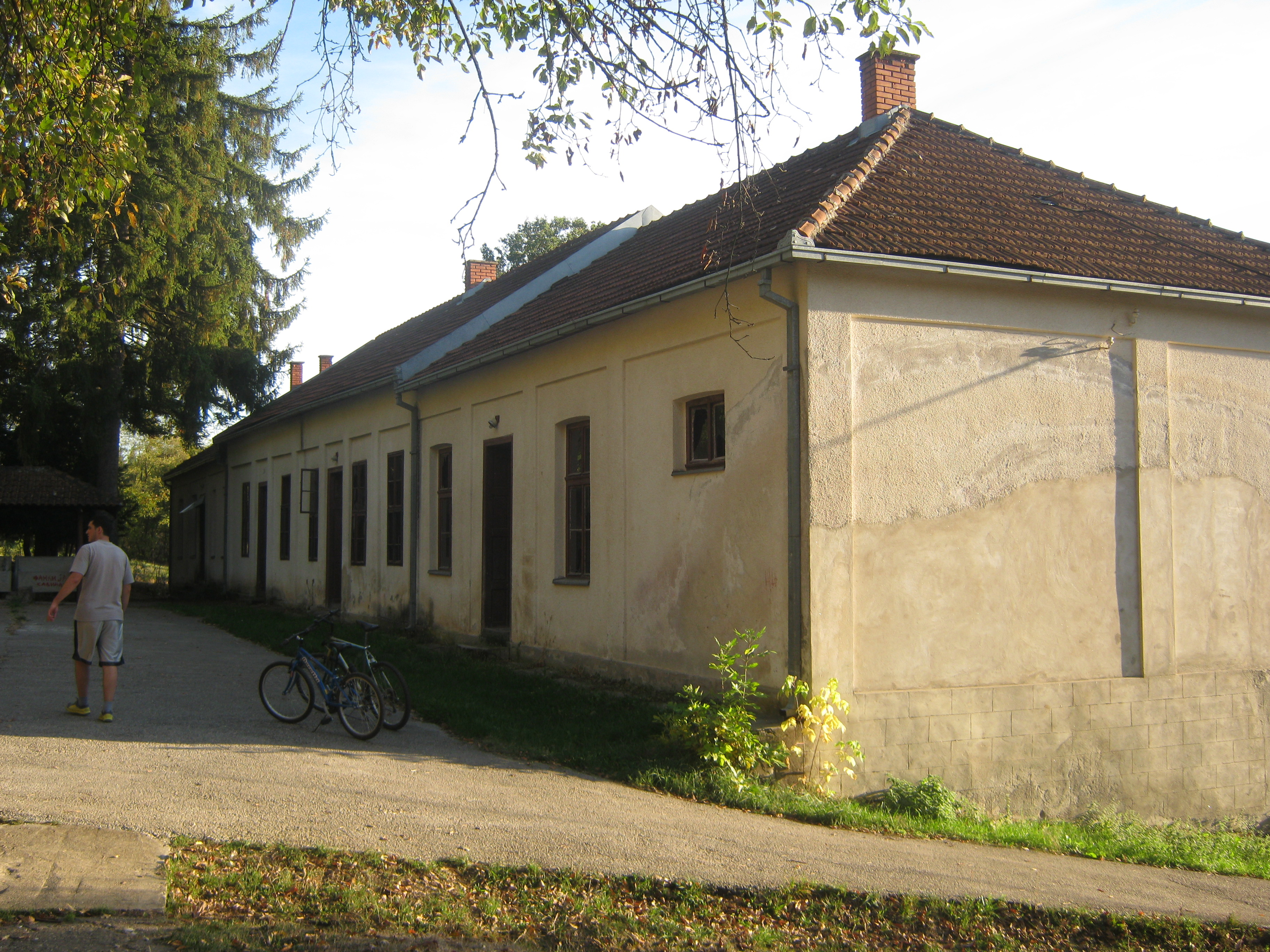 Нова школска зграда на Савинцу, изграђена у 20. веку када је у селу било много више деце.